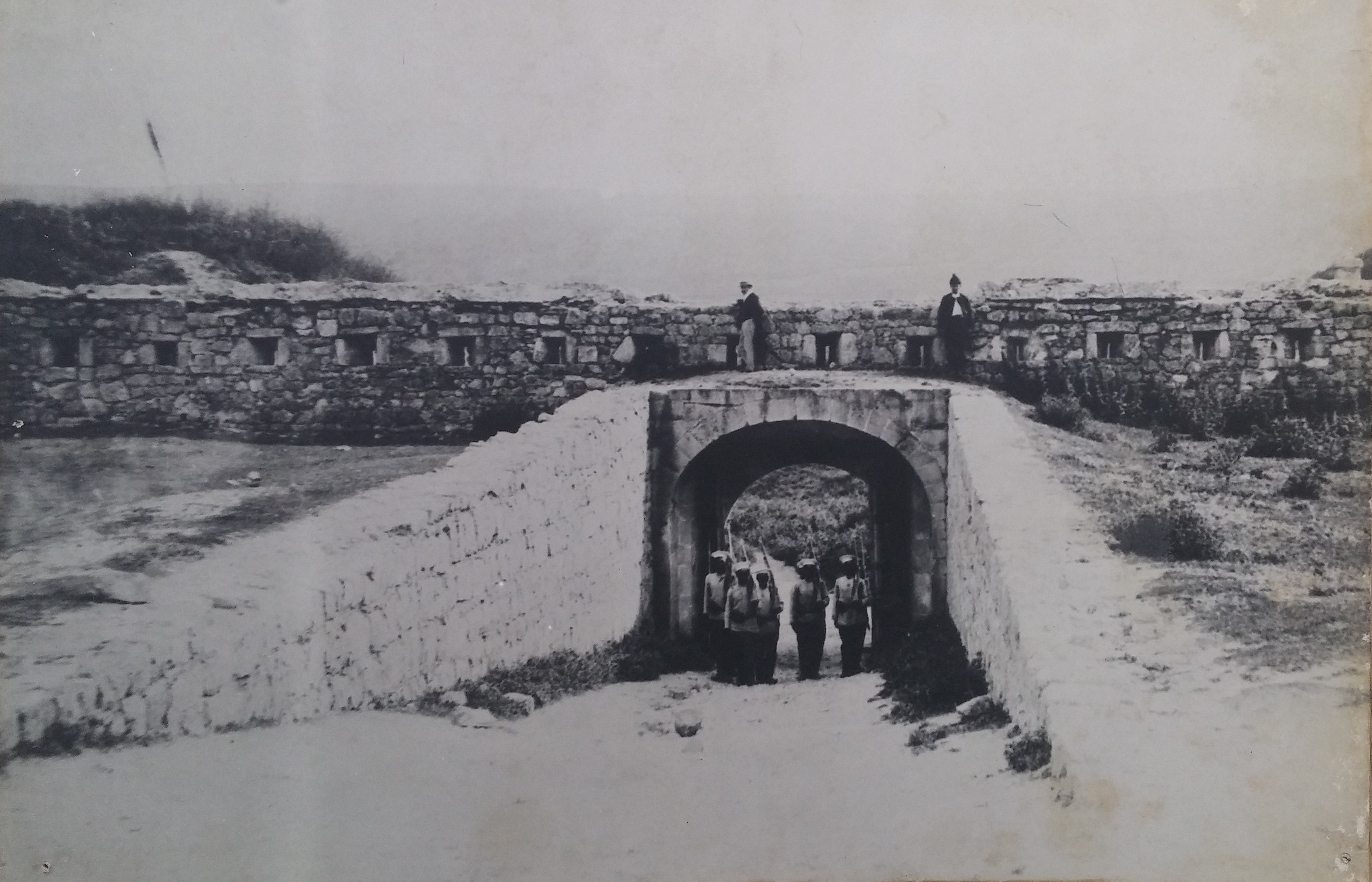 Част от Варненската крепост.